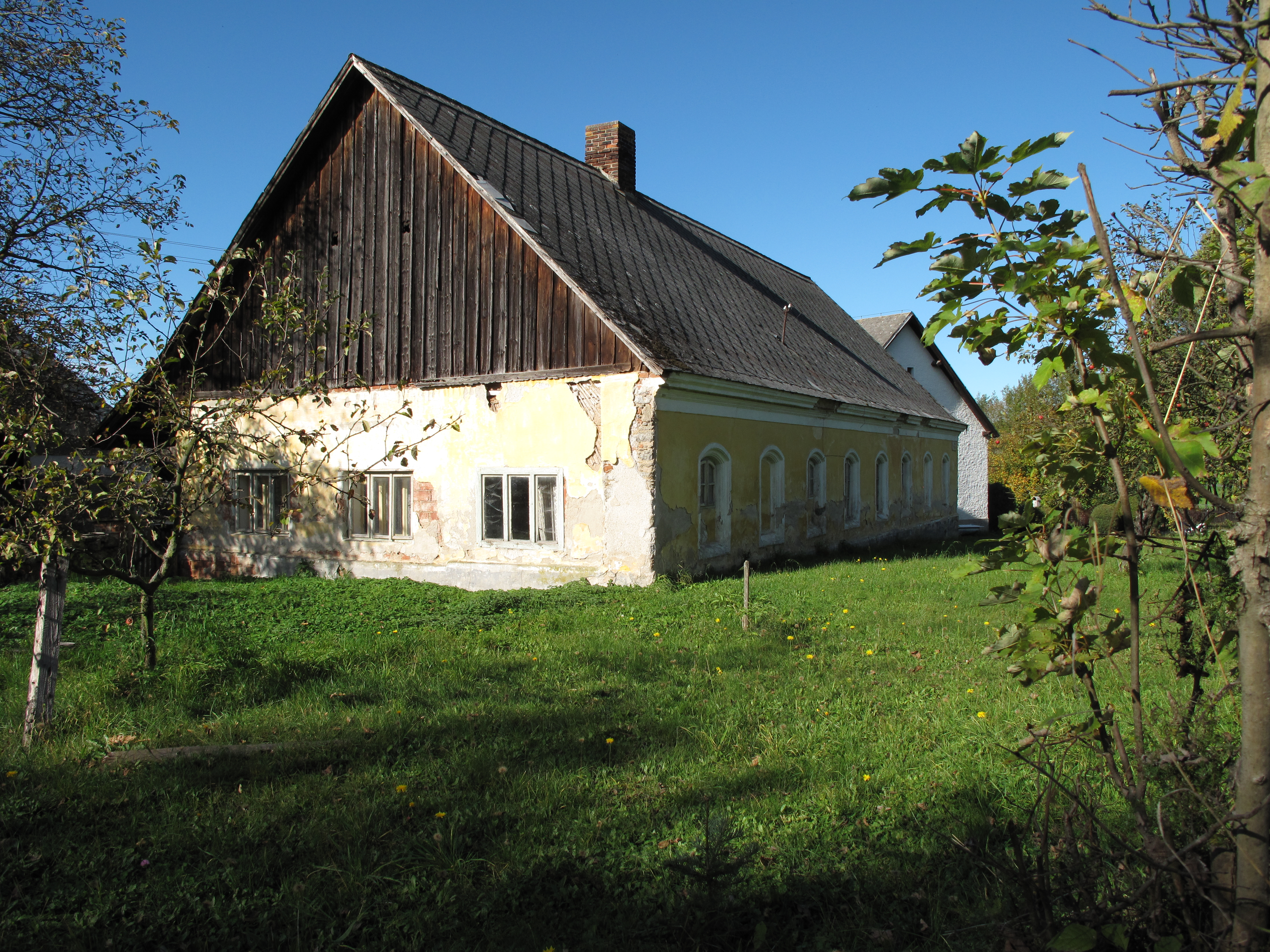 Velký dům v Mokřanech. Okres Příbram, Česká republika.